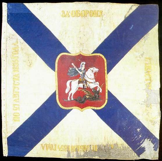 Морской Георгиевский знамённый флаг - награда за защиту Севастополя в Крымскую войну.